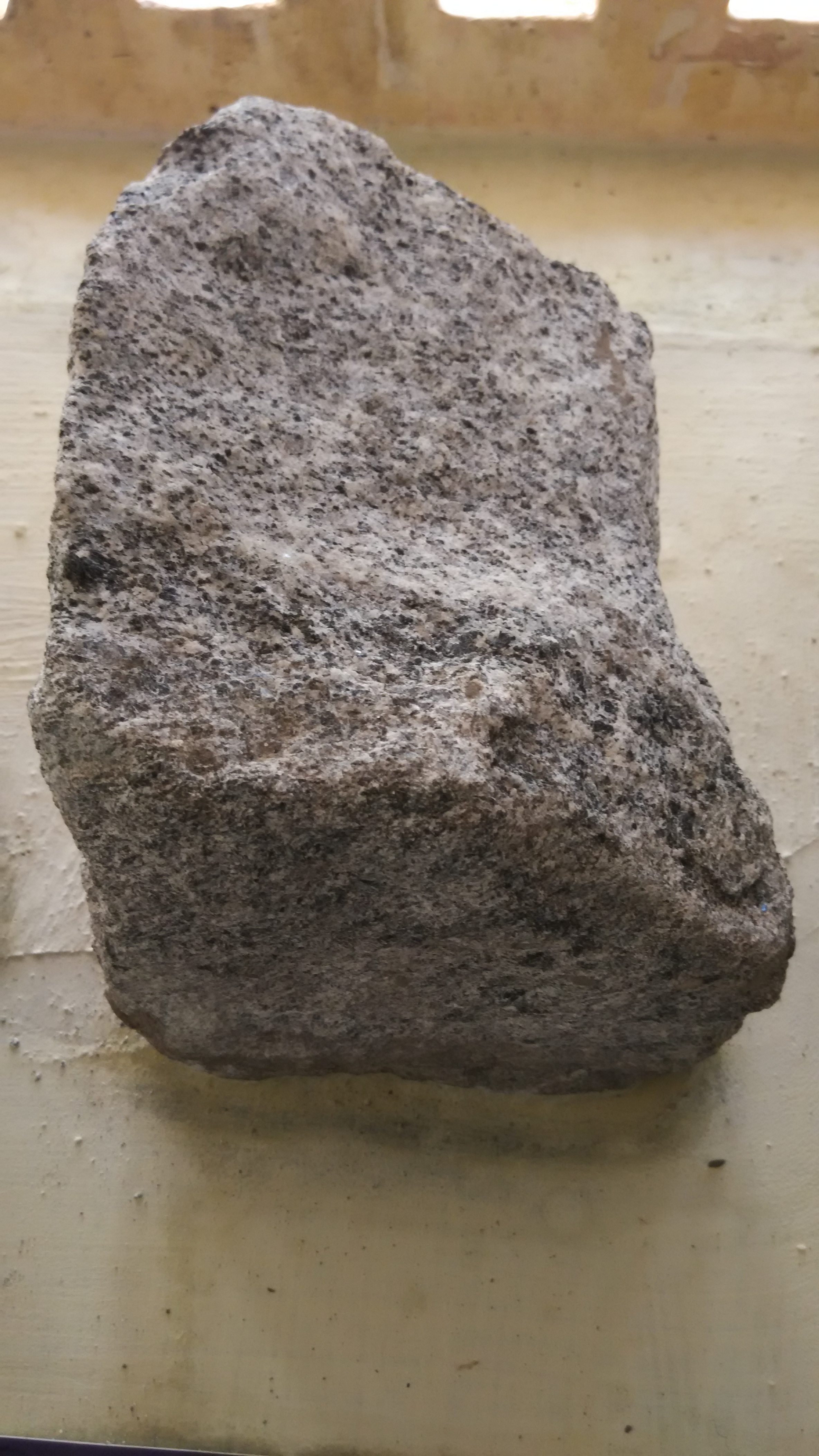 பெரியார் பல்கலைக் கழகத்தின் நிலத்தியல் துறையிலுள்ள காட்சிப்பொருள்.